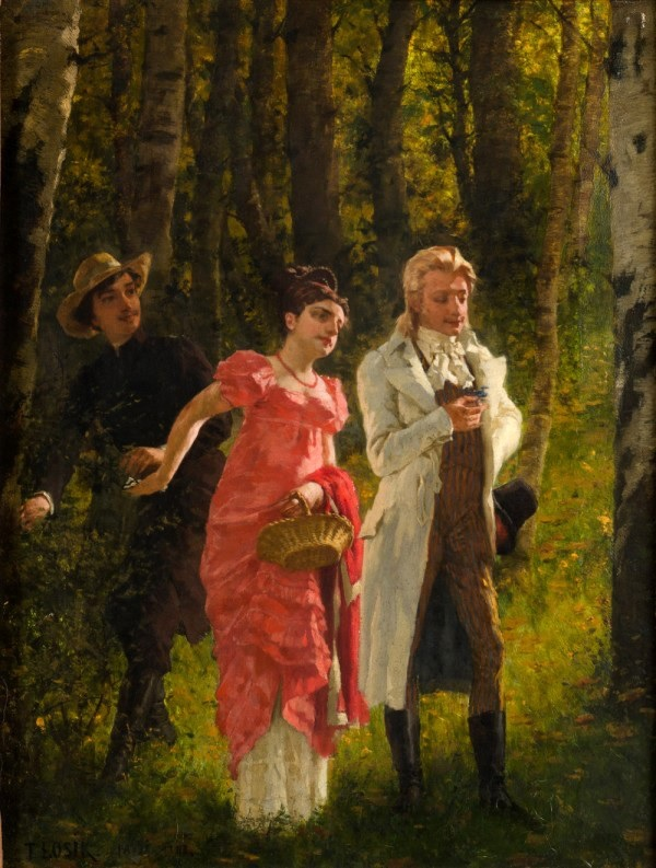 Promenade dans la forêt (Télimène, Thadée et le Comte). Illustration pour Pan Tadeusz d'Adam Mickiewicz